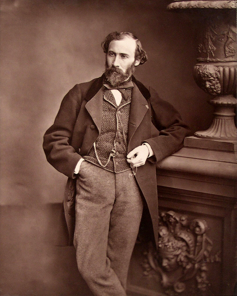 Woodburytype of Octave Feuillet, 1876/84 - D'après une photographie d'Antoine Samuel Adam-Salomon (gravure parue le 17 avril 1862 dans L'Univers Illustré n°205.)